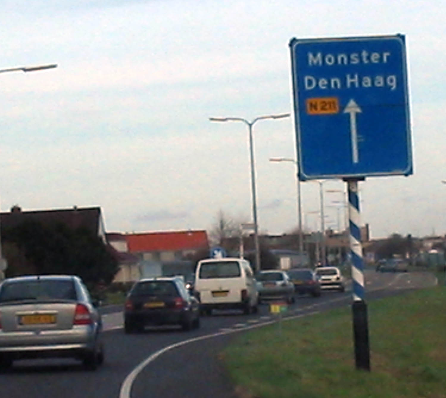 N211, bij Monster, 6 november 2005